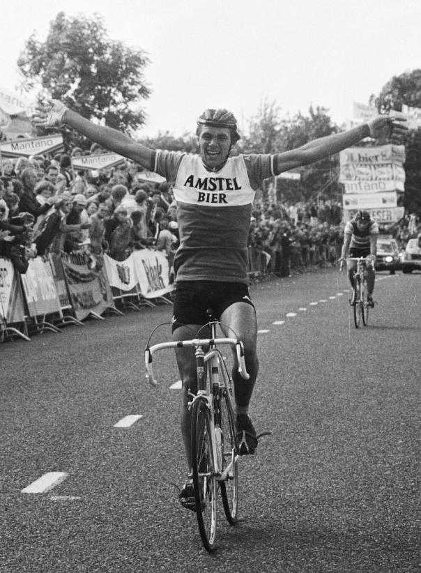 Jos Lammertink